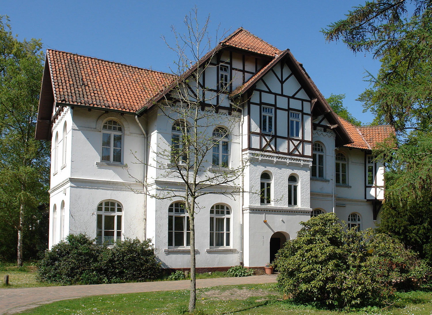 Klinikum Bremen-Ost, Haus 1. Ehemals St. Jürgen Asyl, Haus I. Herstellung 1900–1904. Funktion: Überwachungs-Station für Männer Das abgebildete Objekt ist ein geschütztes Kulturdenkmal in der Freien Hansestadt Bremen, mit der Nr. 1657 beim Landesamt für Denkmalpflege registriert.